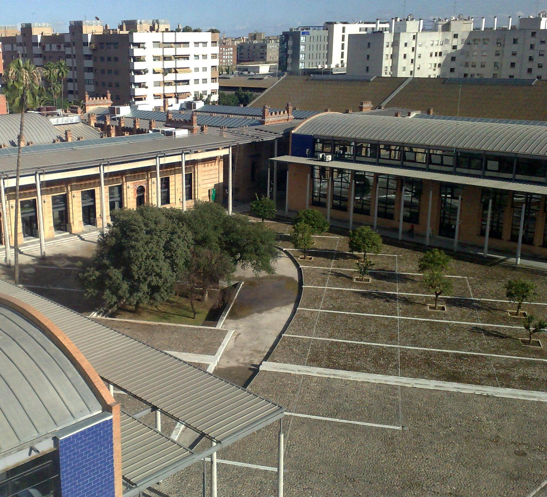 Patio interior de la Consejería de Agricultura y Pesca.